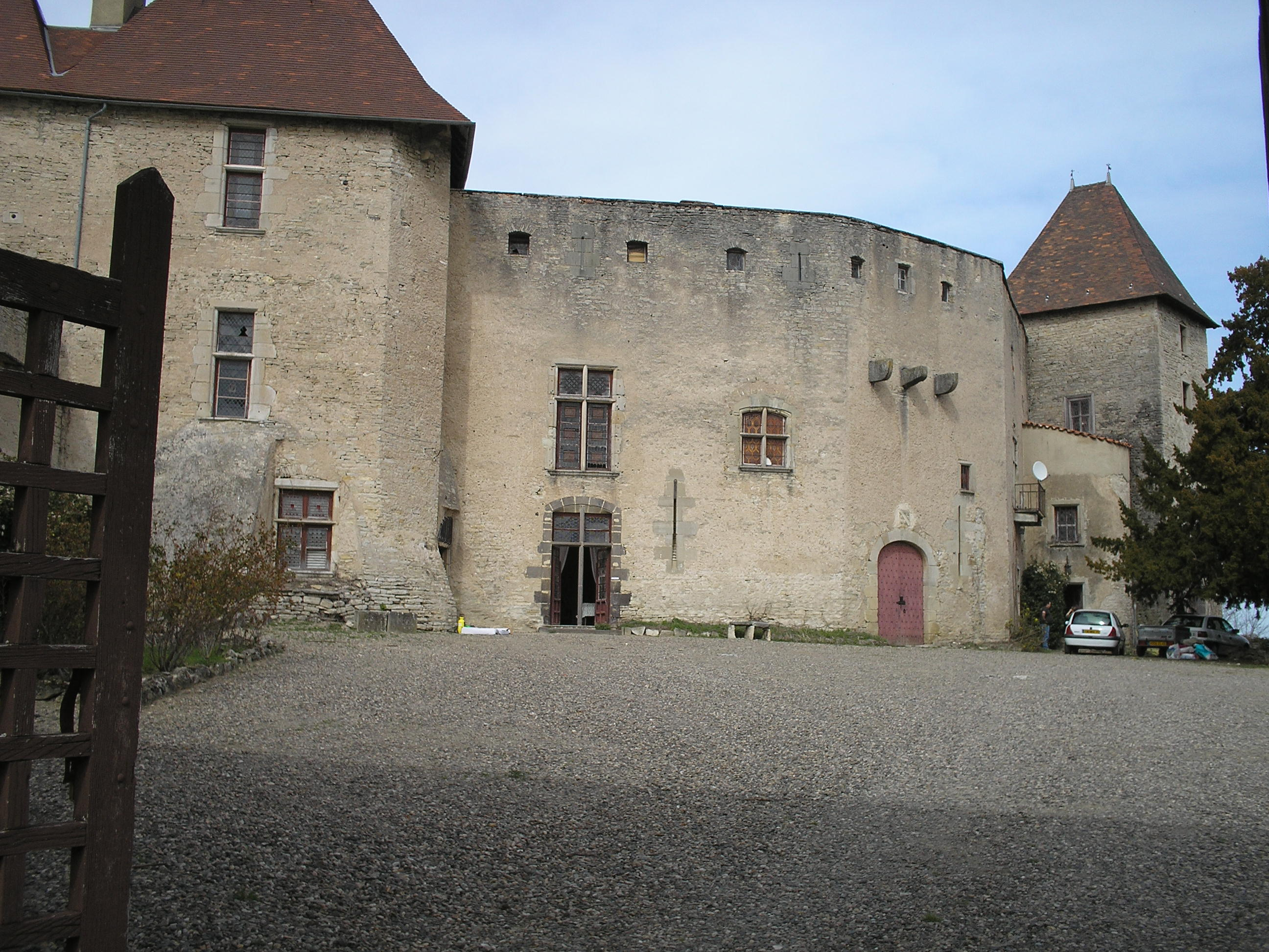 Château de la Roche, (France). La grande cour et l'entrée du château